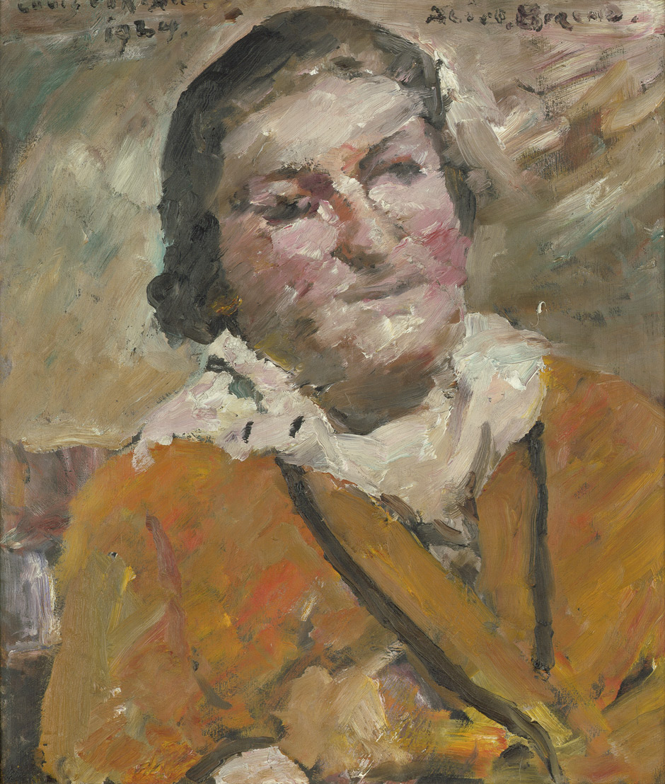 Portrait der Schriftstellerin Alice Berend. Öl auf Sperrholz. 64 x 55 cm. Oben rechts mit Pinsel in Braun signiert und datiert sowie oben links bezeichnet "Alice Berend". 1924. Berend-Corinth 962.